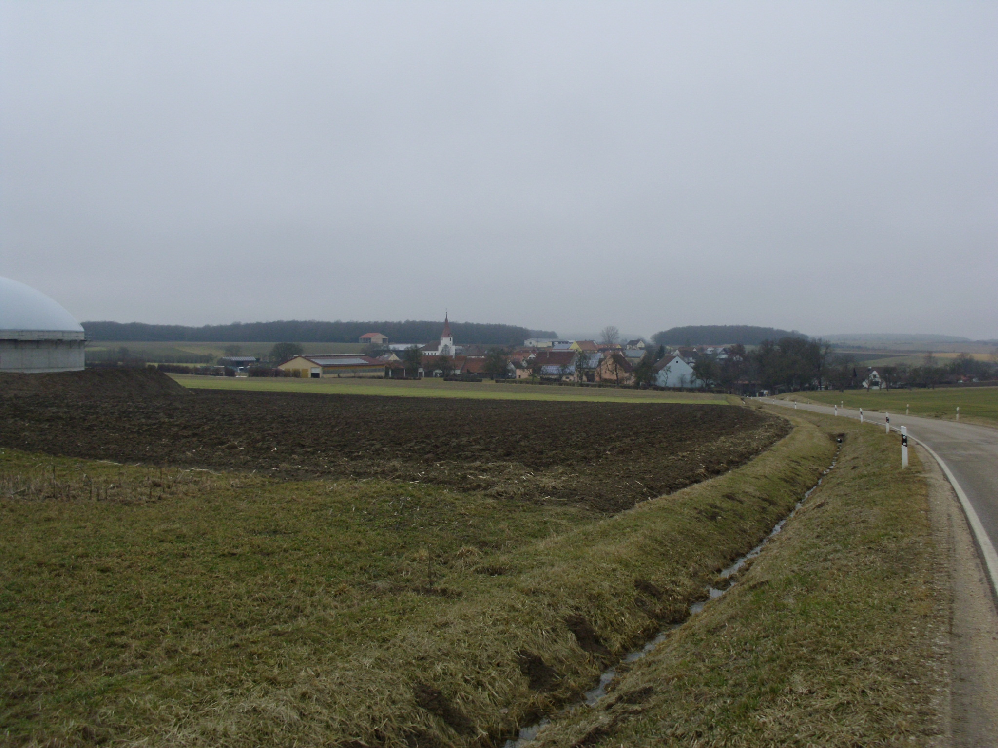 Stetten, Ortsteil von Gunzenhausen im mittelfränkischen Landkreis Weißenburg-Gunzenhausen (Bayern)